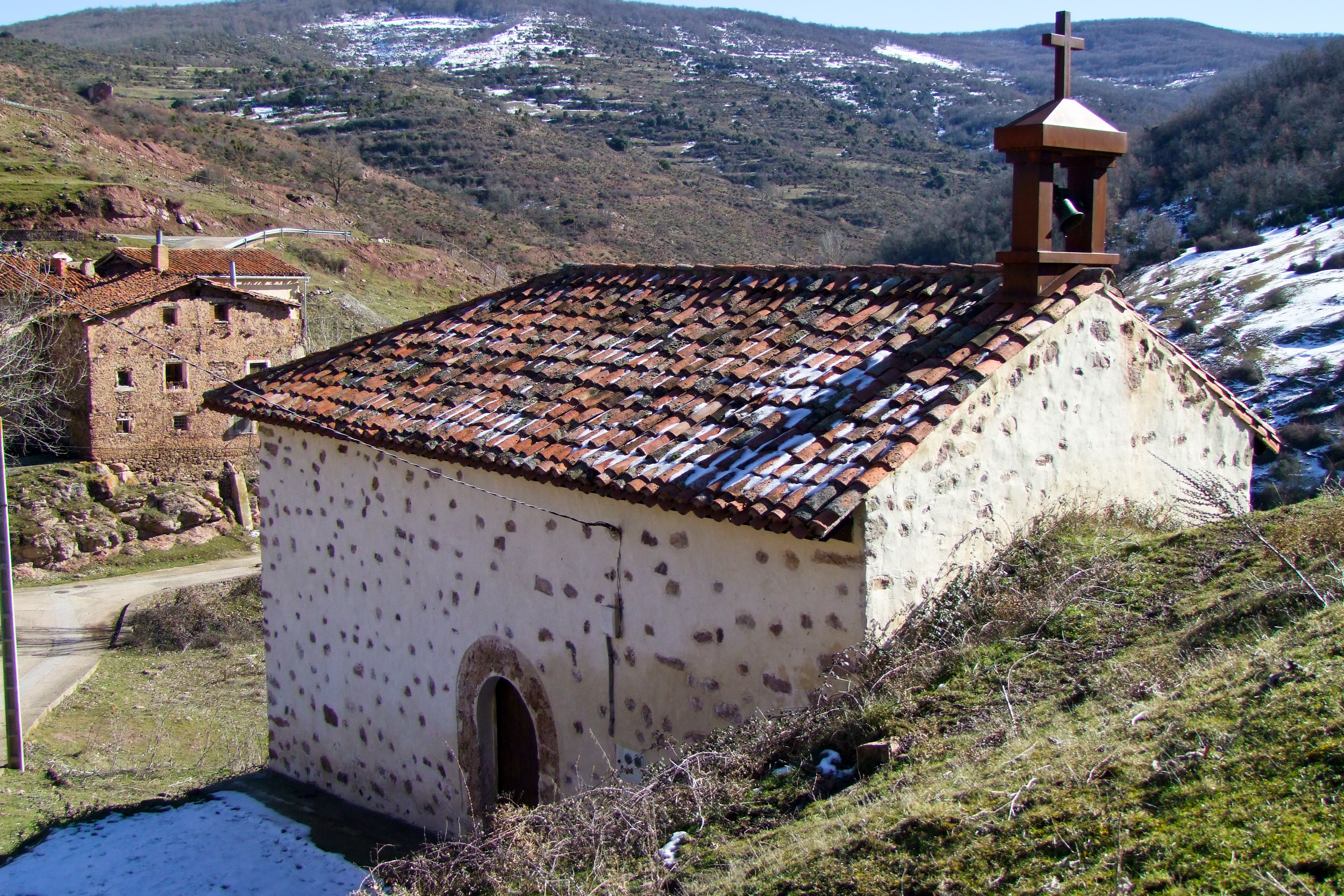 Ermita del Santo Cristo en la localidad de Pinillos de Cameros, La Rioja - España